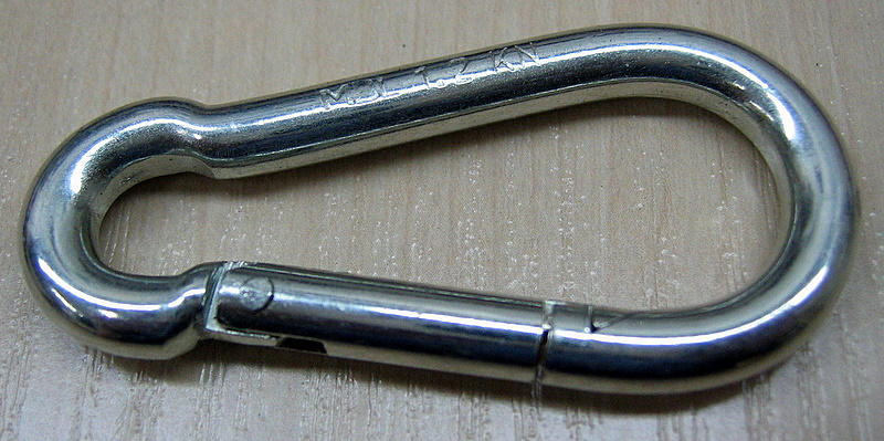 Vabakäiguga karabiin